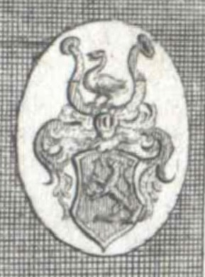 Wappen von Johannes Busereuth (1548–1610) aus Augsburg, Kupferstich oder Radierung